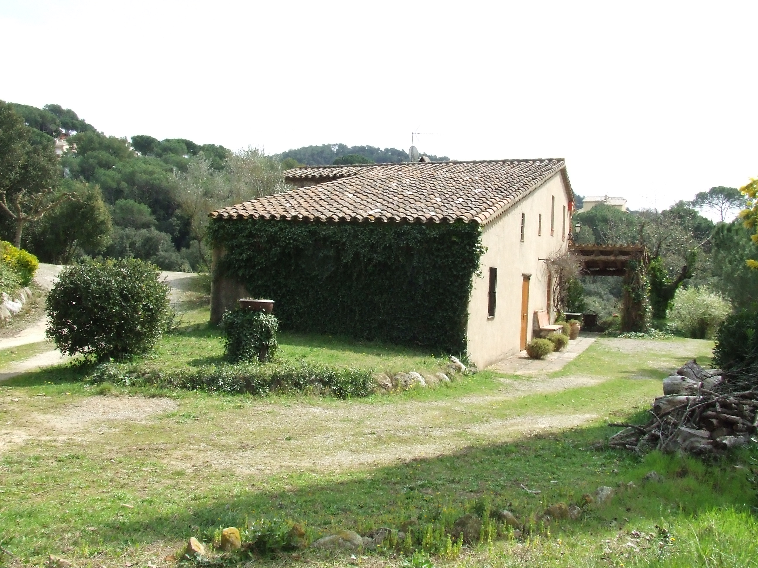 Can Mai-hi-són (Bigues, Bigues i Riells, Vallès Oriental)